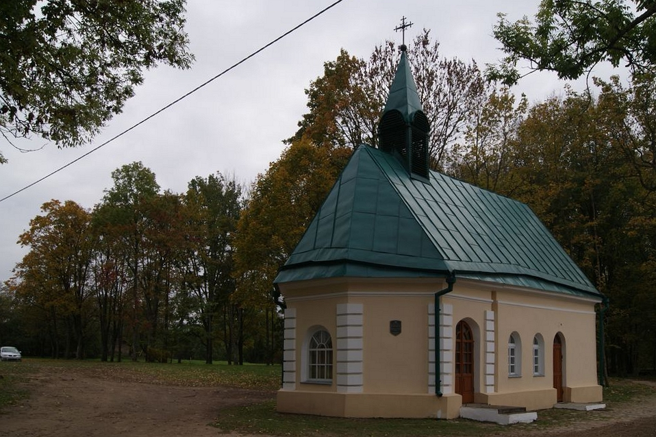 Сядзіба Агінскіх у Залессі пасля рэстаўрацыі